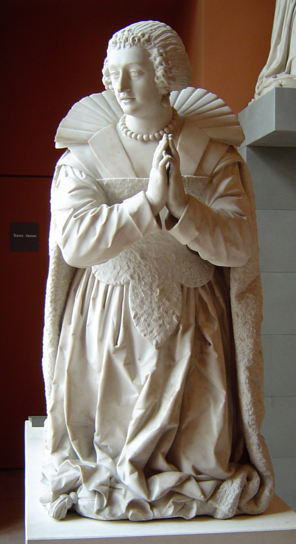 Tombeau de Charlotte-Catherine de La Tremoille, princesse de Condé.